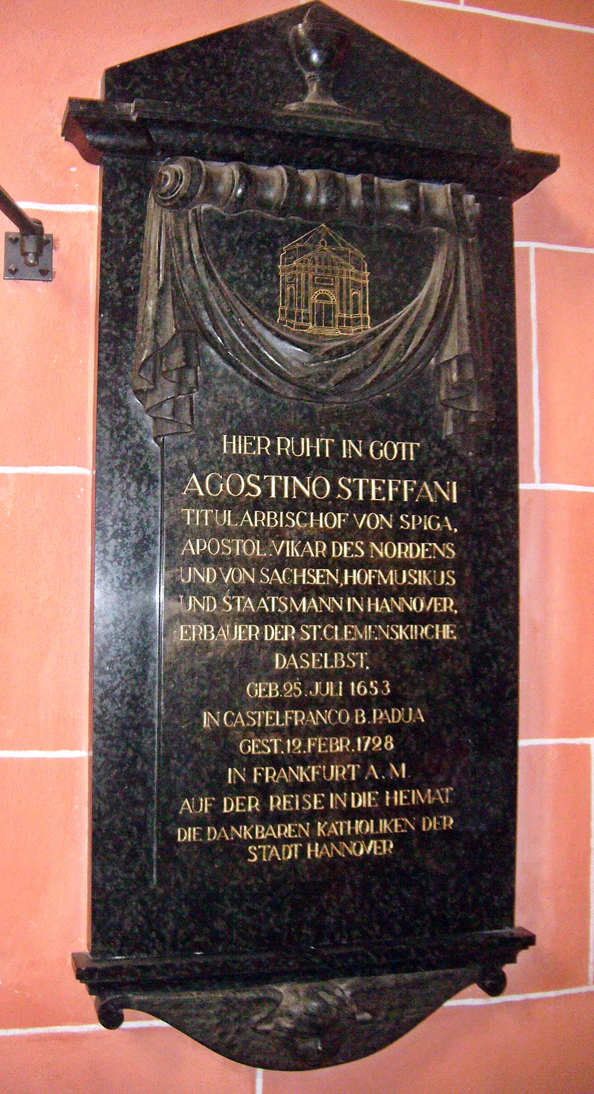 Agostino Steffani (1654-1728), Komponist und kath. Bischof, Epitaph im Kaiserdom Frankfurt mit Erwähnung und Abbildung der Basilika St. Clemens Hannover